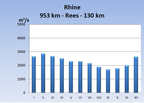 Reini hüdrograaf Reeses